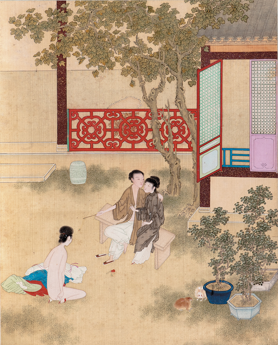 中文（香港）: 金瓶梅插圖